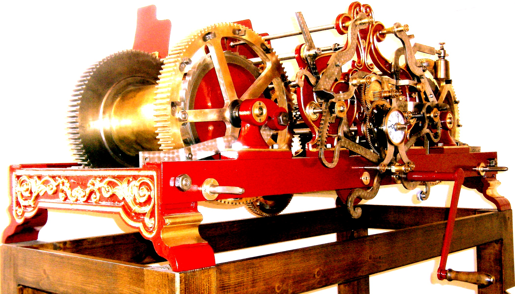 Mecanismo principal del reloj de la Catedral de Barbastro, obra de Francisco Coll Marqués